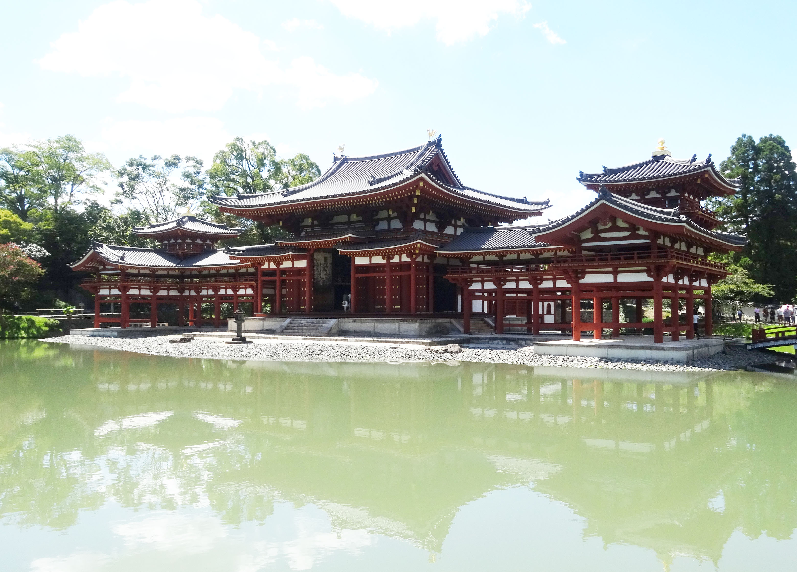 Phoenix Hall Repaired in 2014